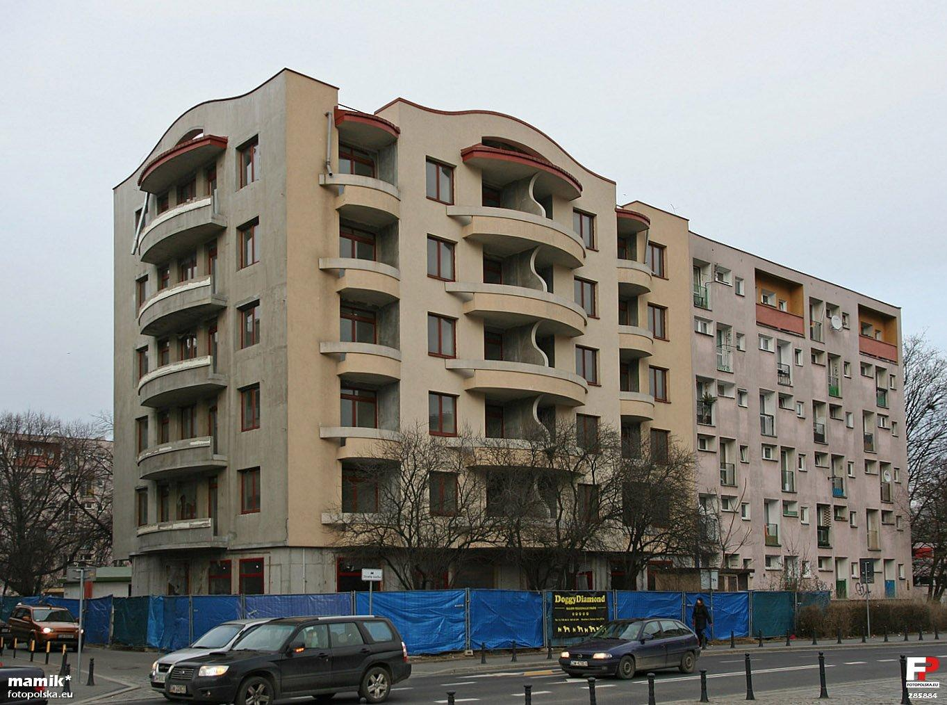 Niedokończony "apartamentowiec" Golden House Stoi frontem do ulicy Purkyniego, ale adres to Kraińskiego 4a. Sąsiedni blok po prawej to Kraińskiego 2-4